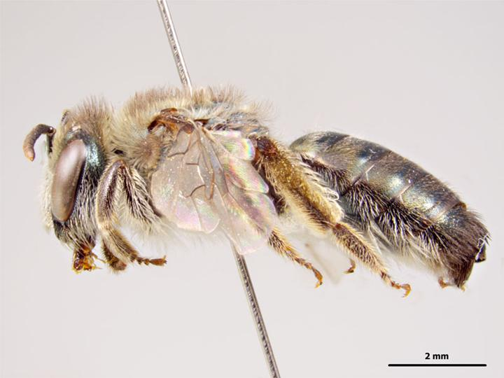 Leioproctus clarki female